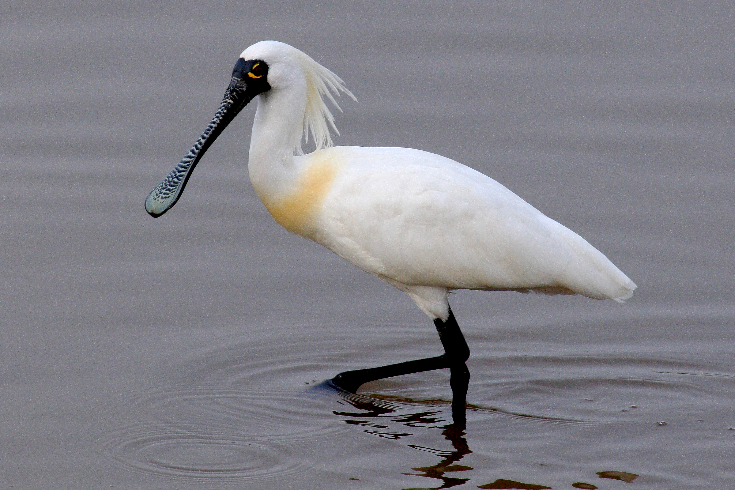 新潟県の阿賀野川で撮影されたクロツラヘラサギ